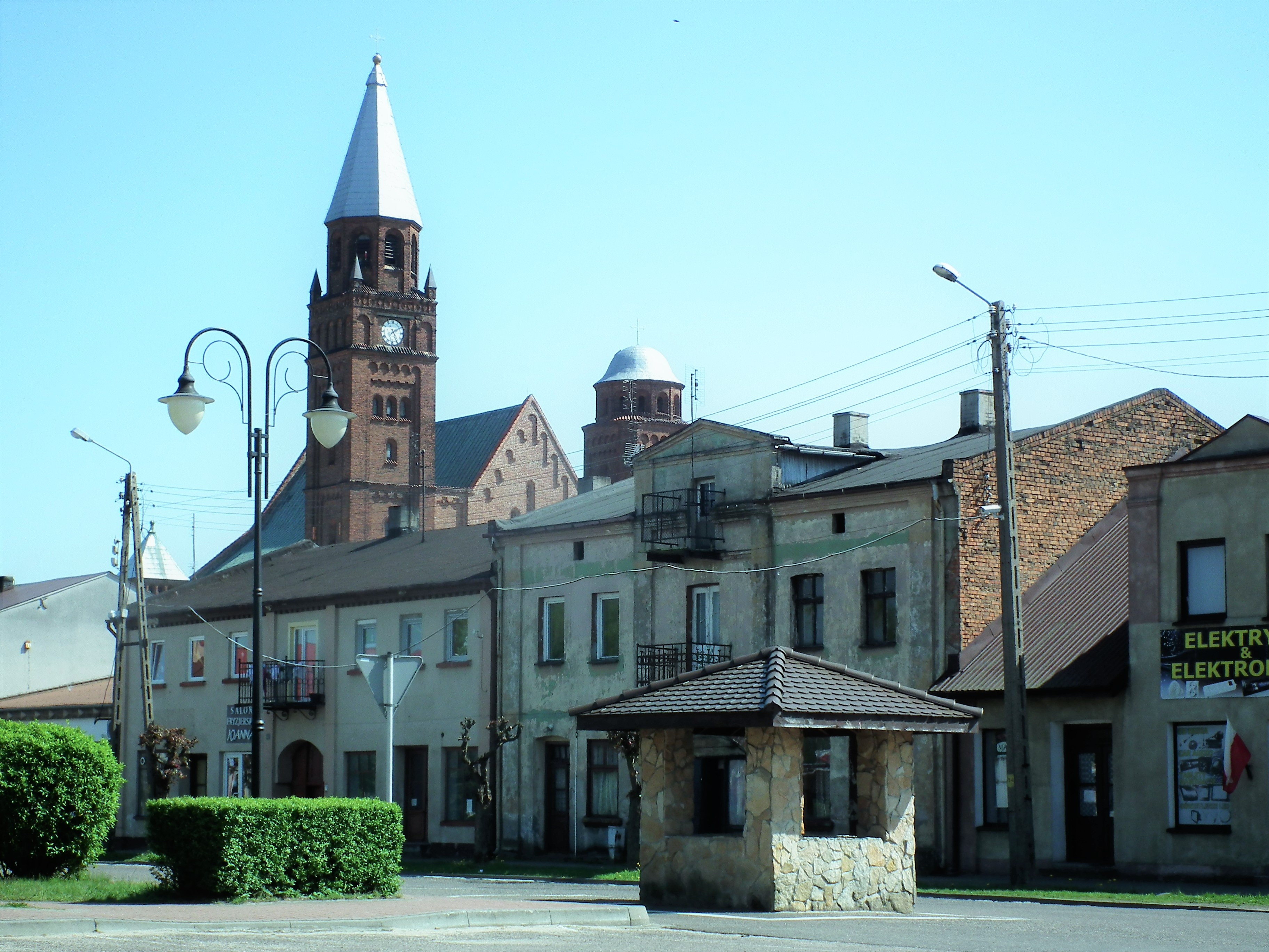 Rynek w Lututowie.